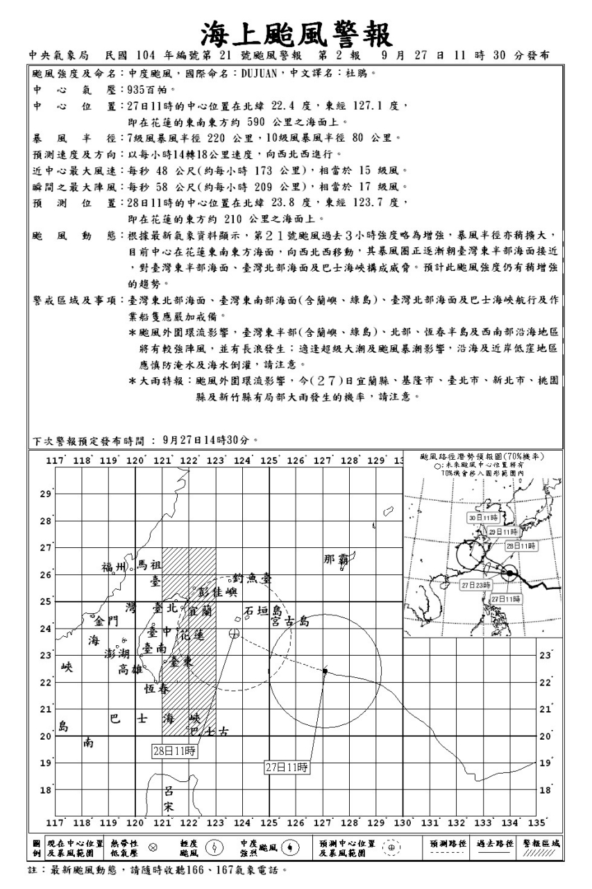 2015年，中央氣象局針對杜鵑颱風發布海上颱風警報，此為第2報。